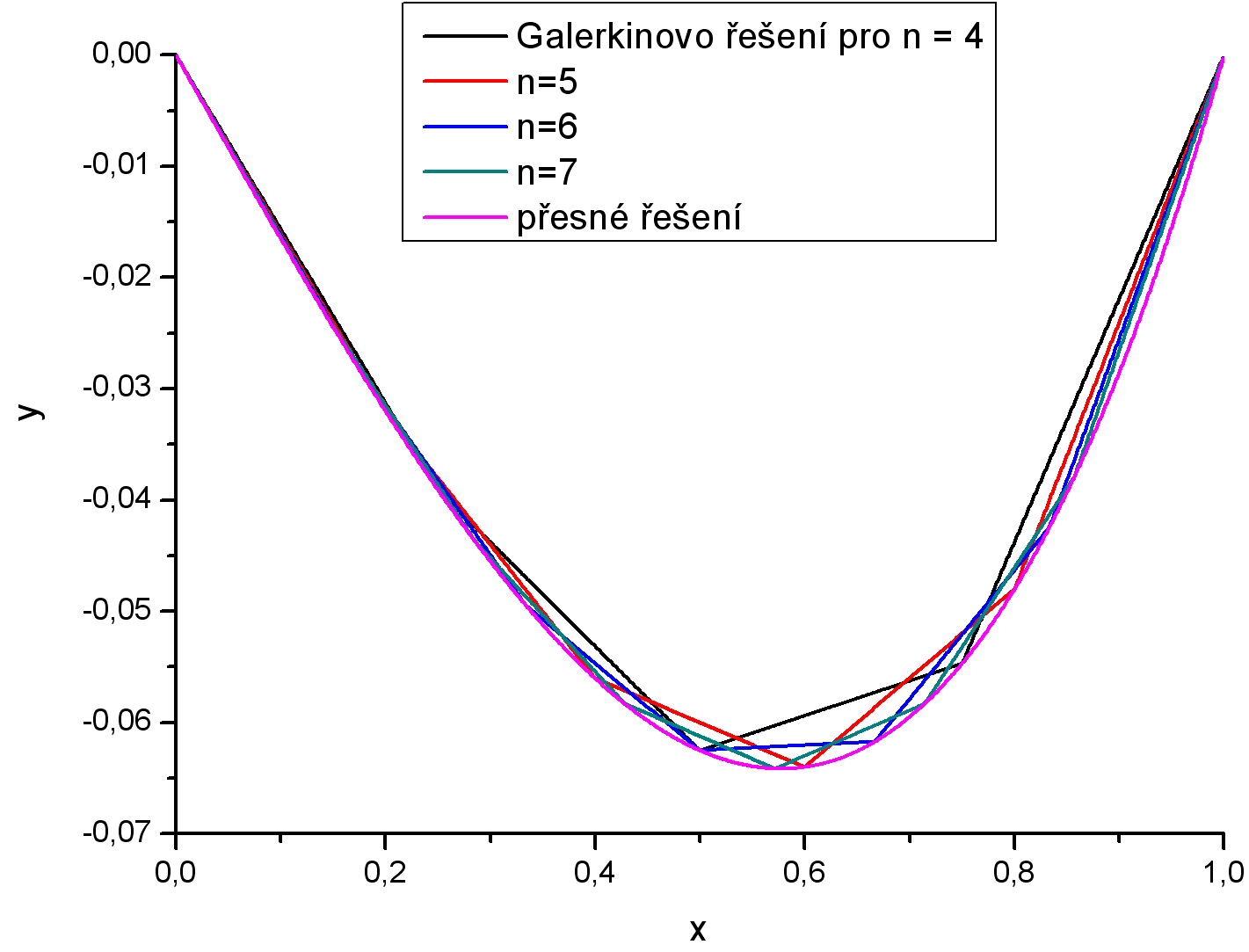 Příklad: přesné řešení diferenciální rovnice a Galerkinovo řešení s Courantovými bázovými funkcemi pro různé diskretizace oblasti.